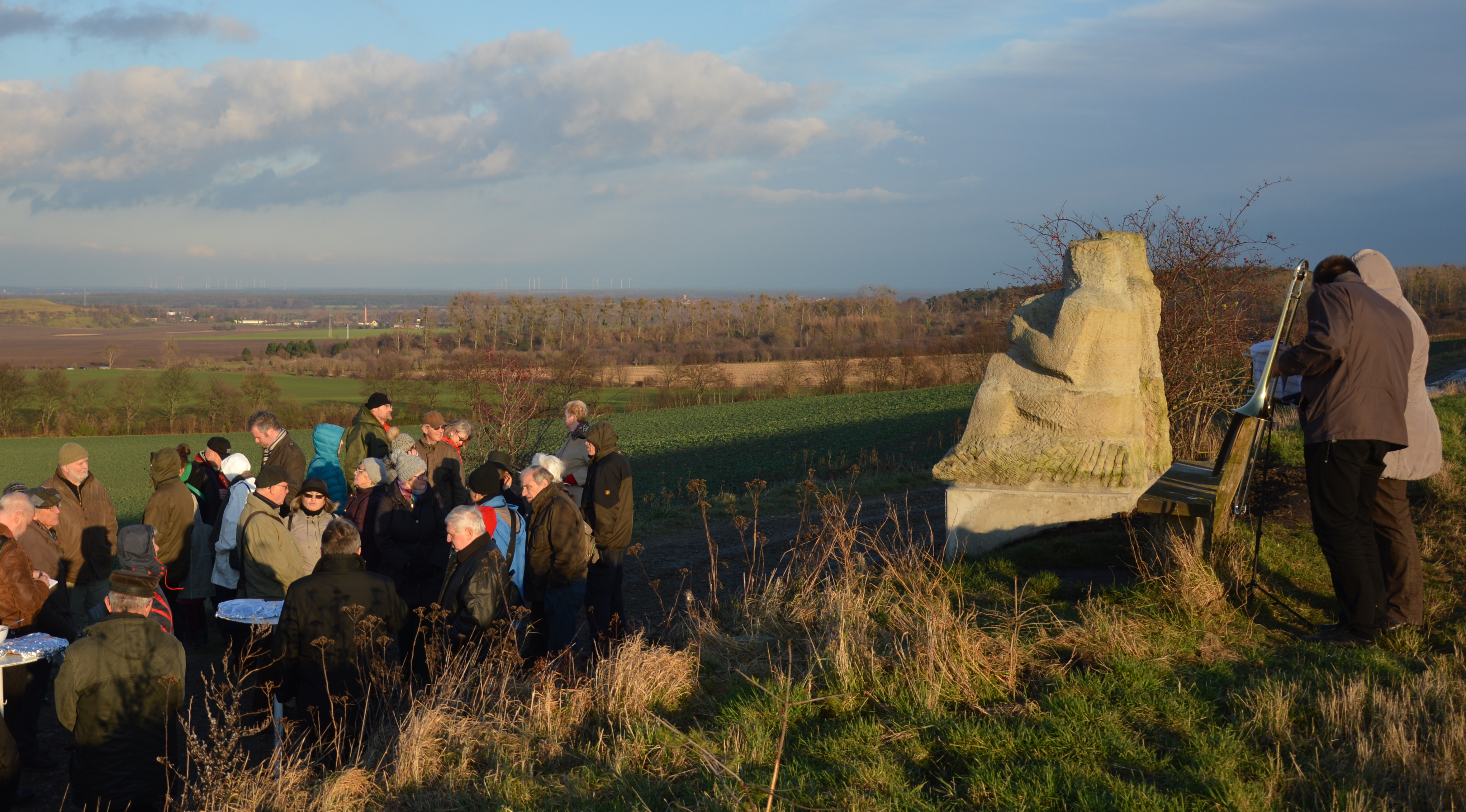 Einweihung der Skulptur Bördepaar